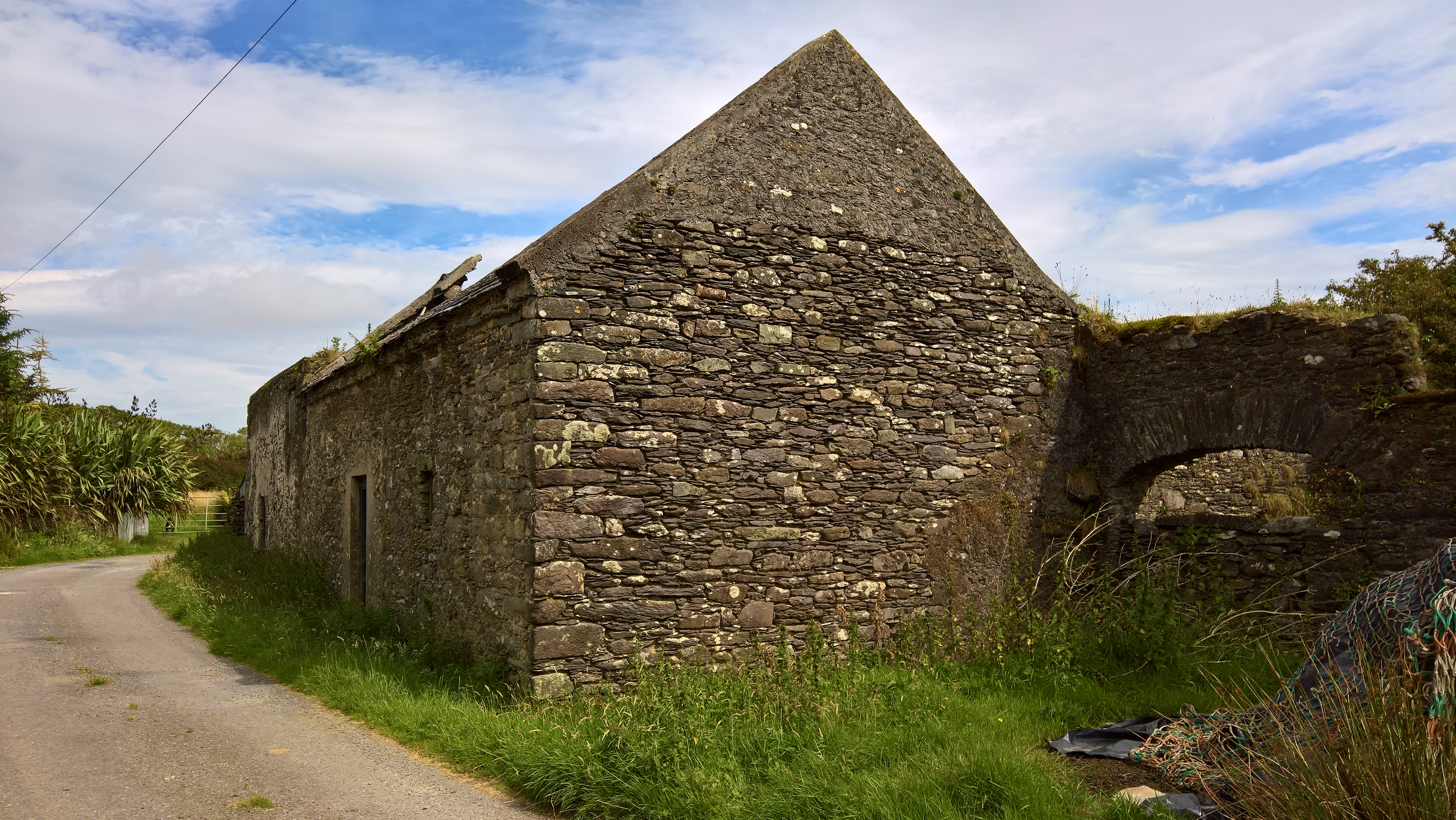 Reste des Fermoyl Castle im Townland Formaoil (TC Trian Iarthach) im nahegelegenen späteren Verwaltungsgebäude